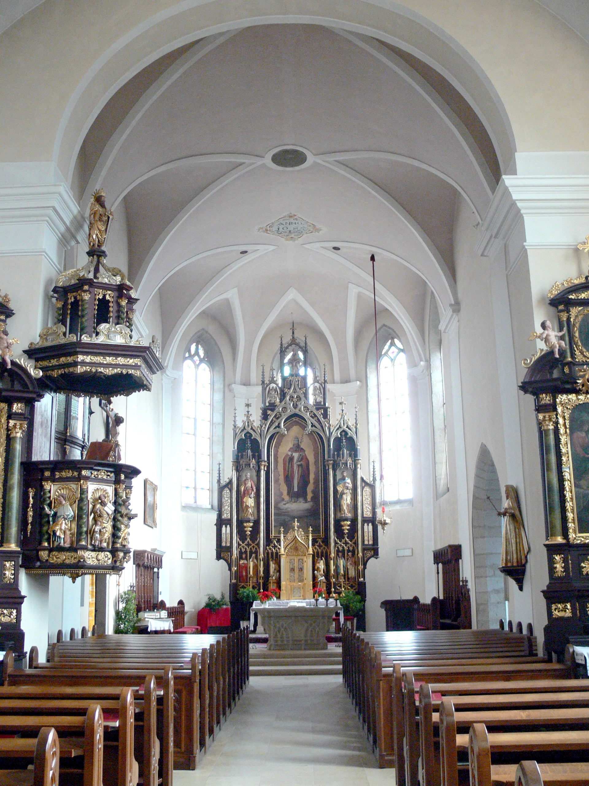 Altenfelden. Parish church - Interior